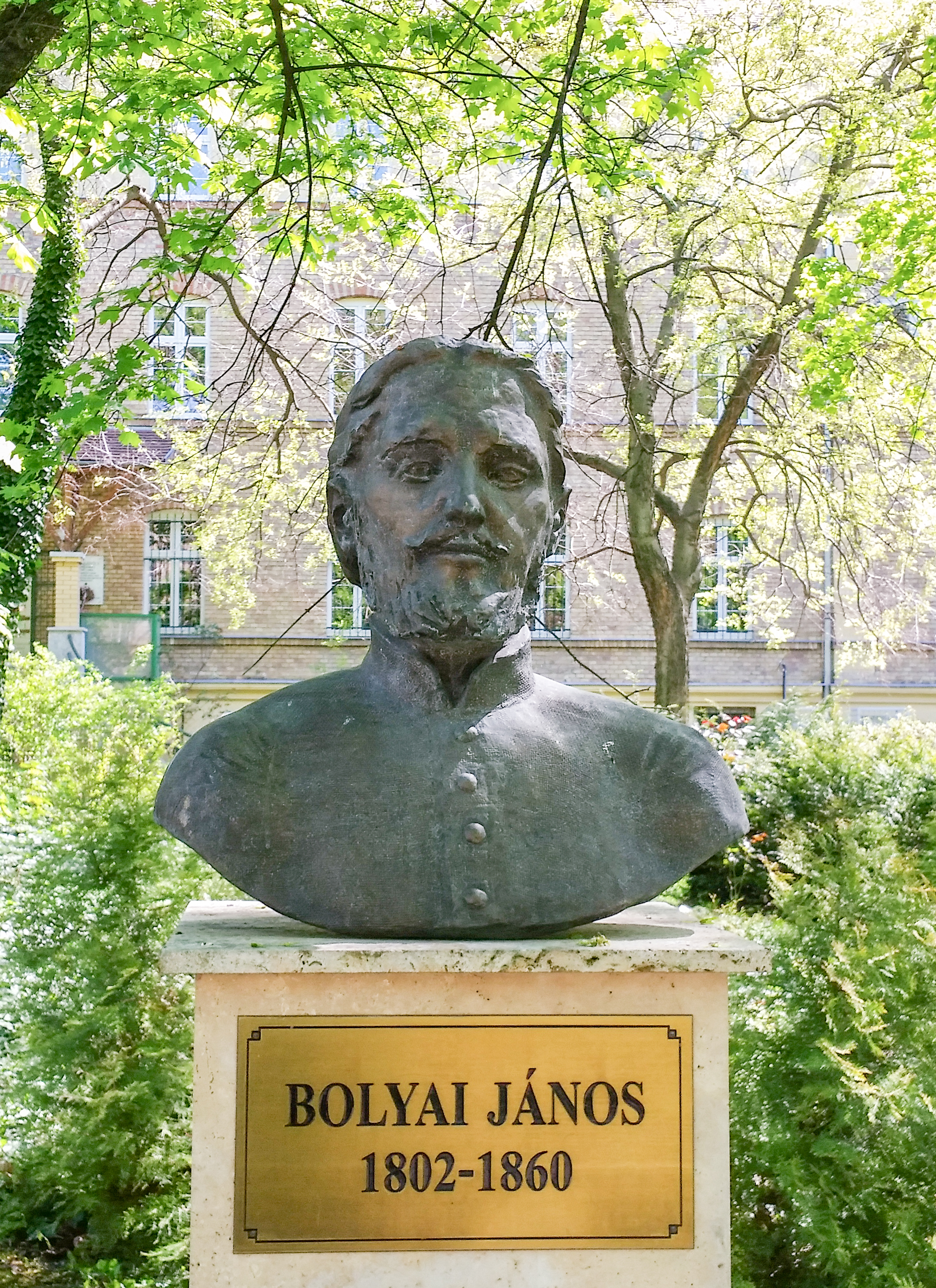 Bust of János Bolyai at the Miklós Zrínyi Military Academy, Budapestlabel QS:Len,"Bust of János Bolyai at the Miklós Zrínyi Military Academy, Budapest" label QS:Lhu,"Bolyai János mellszobra a volt Zrínyi Miklós akadémia területén (Berek Lajos alkotása)"